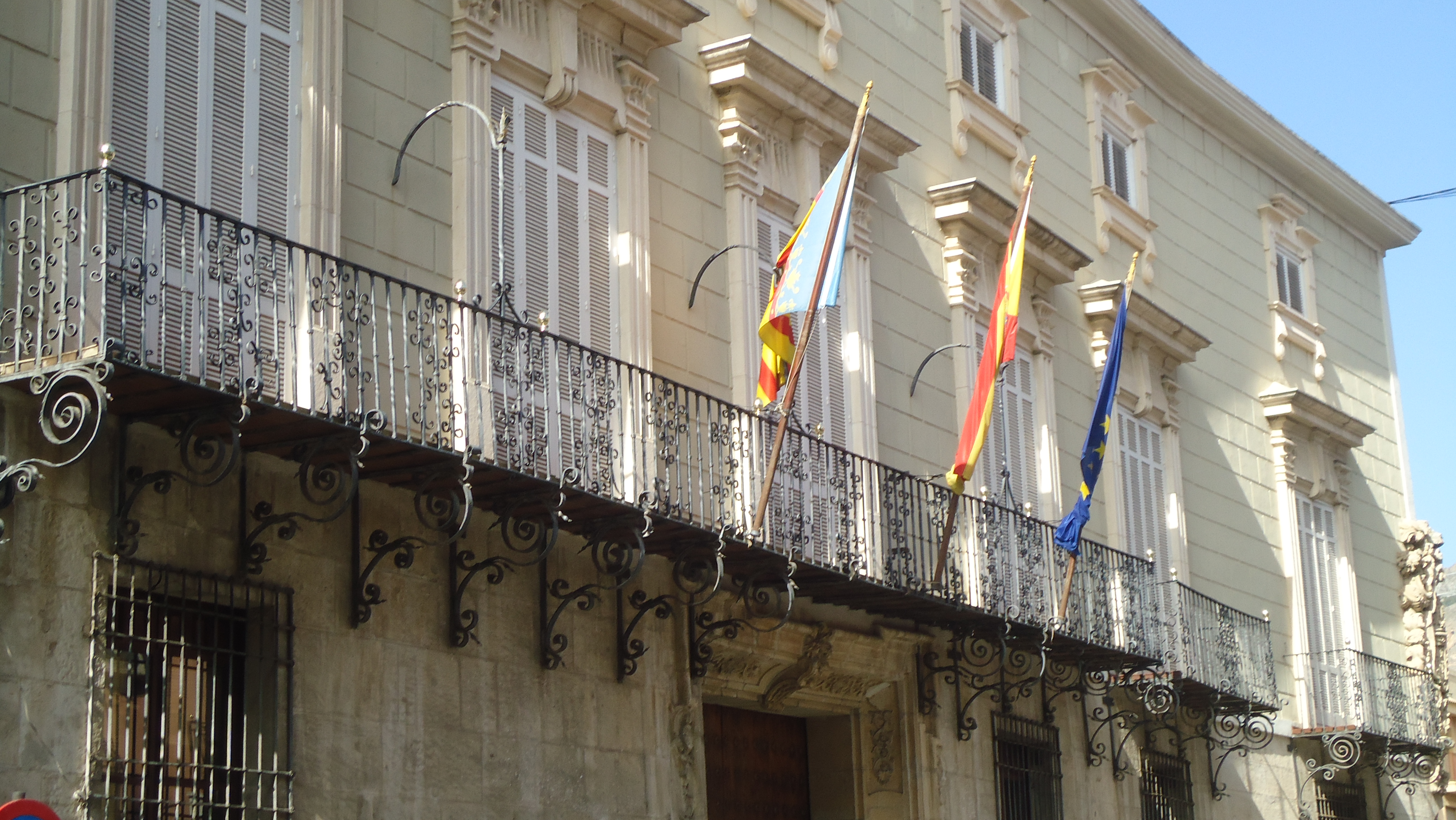 Balconada del Palacio del Marqués de Arneva, actual sede del Ayuntamiento de Orihuela